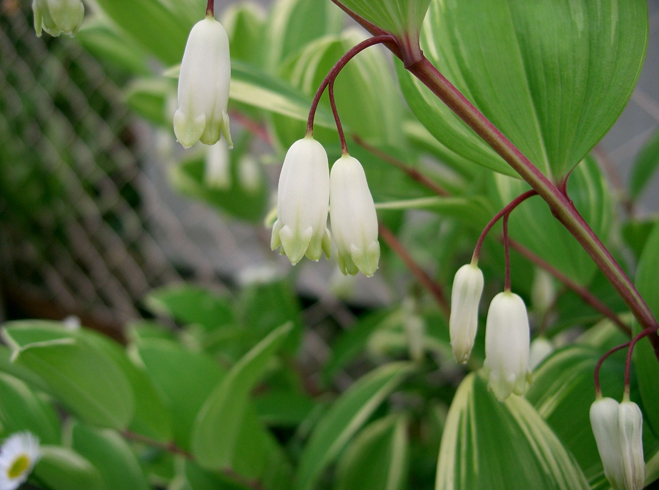 Polygonatum odoratum 'Variegatum'